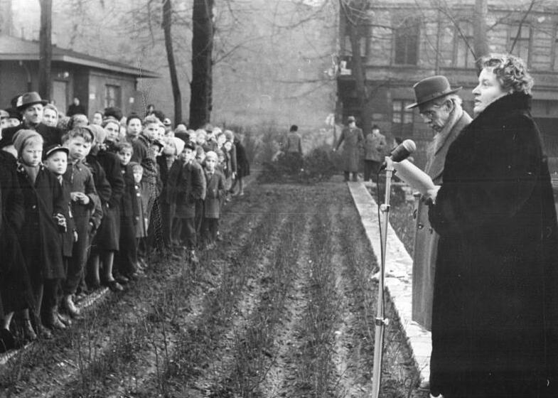 Berlin, Gedenkfeier für Heinrich Zille Zentralbild Dimer 10.1.1958 Berliner ehrten ihren "Vater Zille" zu seinem 100. Geburtstag Am 10. Januar 1958 fand im Zillepark im Norden Berlins eine Ehrung des Meisters zu seinem 100. Geburtstag statt. Prof. Nagel und Stadtrat Johanna Blocha sprachen zu den zahlreich erschienen kleinen und großen Berlinern. Vertreter des Ministeriums für Kultur, der Akademie der Künste, des Kulturbundes, des Magistrats von Gross-Berlin legten am Denkmal Heinrich Zilles Kränze nieder. UBz: Frau Stadtrat Johanna Blecha hält die Gedenkrede. Abgebildete Personen: Nagel, Otto Prof.: Maler, Präsident der Akademie der Künste (AdK), Nationalpreisträger, Vaterländischer Verdienstorden (VVO) in Gold, DDR (GND 118586300)